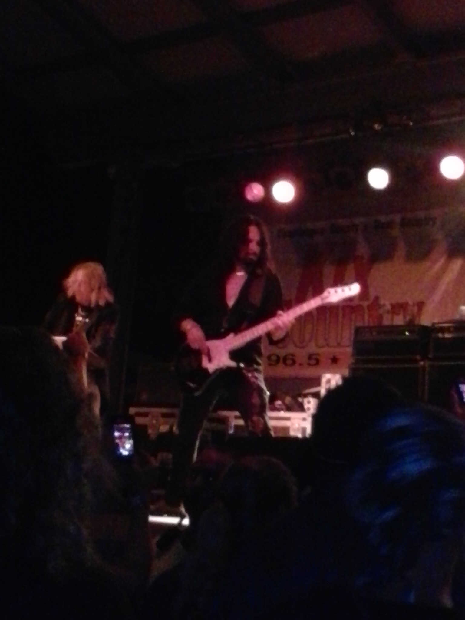 Bjorn Englen